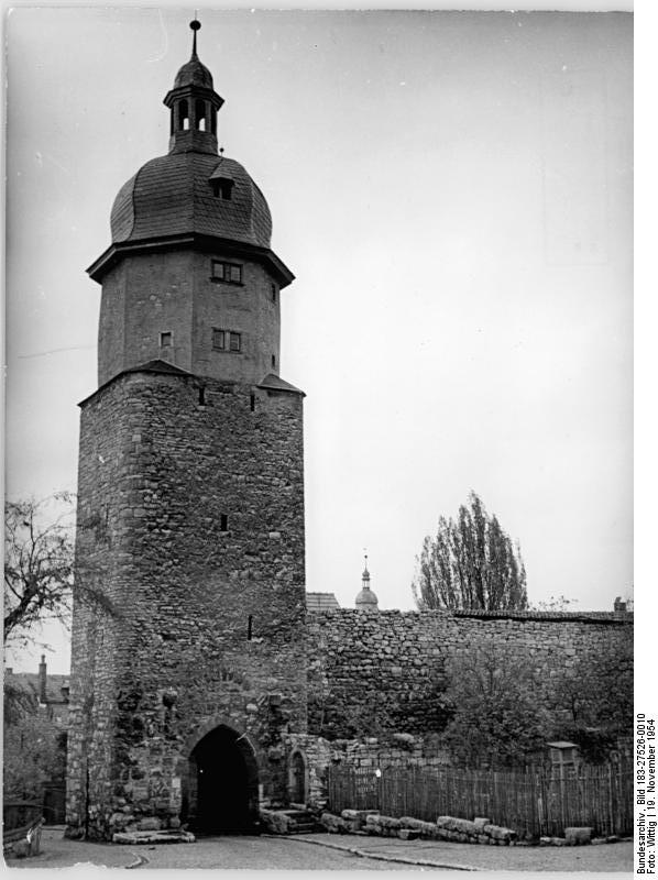 Zentralbild-TBD-Wittig 19.11.1954 -2603- Das 1250-jährige Arnstadt UBz: Der 1334 erbaute Neutorturm mit der alten Stadtmauer, im Hintergrund der Turm der Oberkirche.